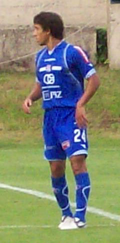 Mate Maleš